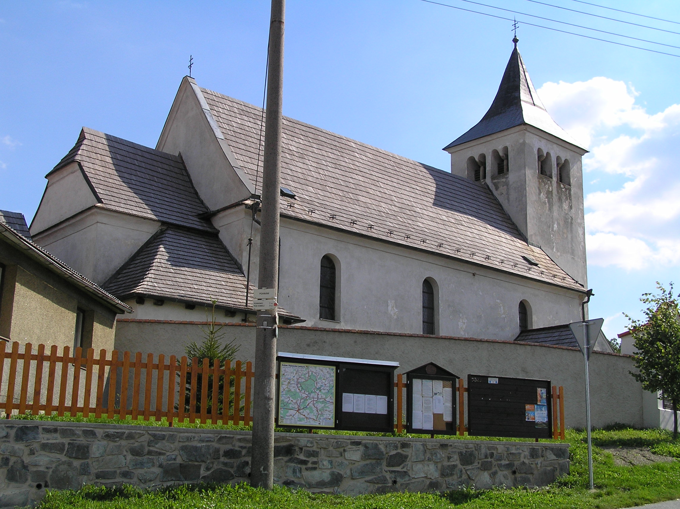 Kostel svatého Prokopa s areálem, Pohnání.